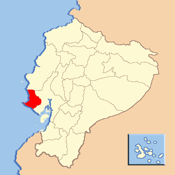 Provincia de Santa Elena.